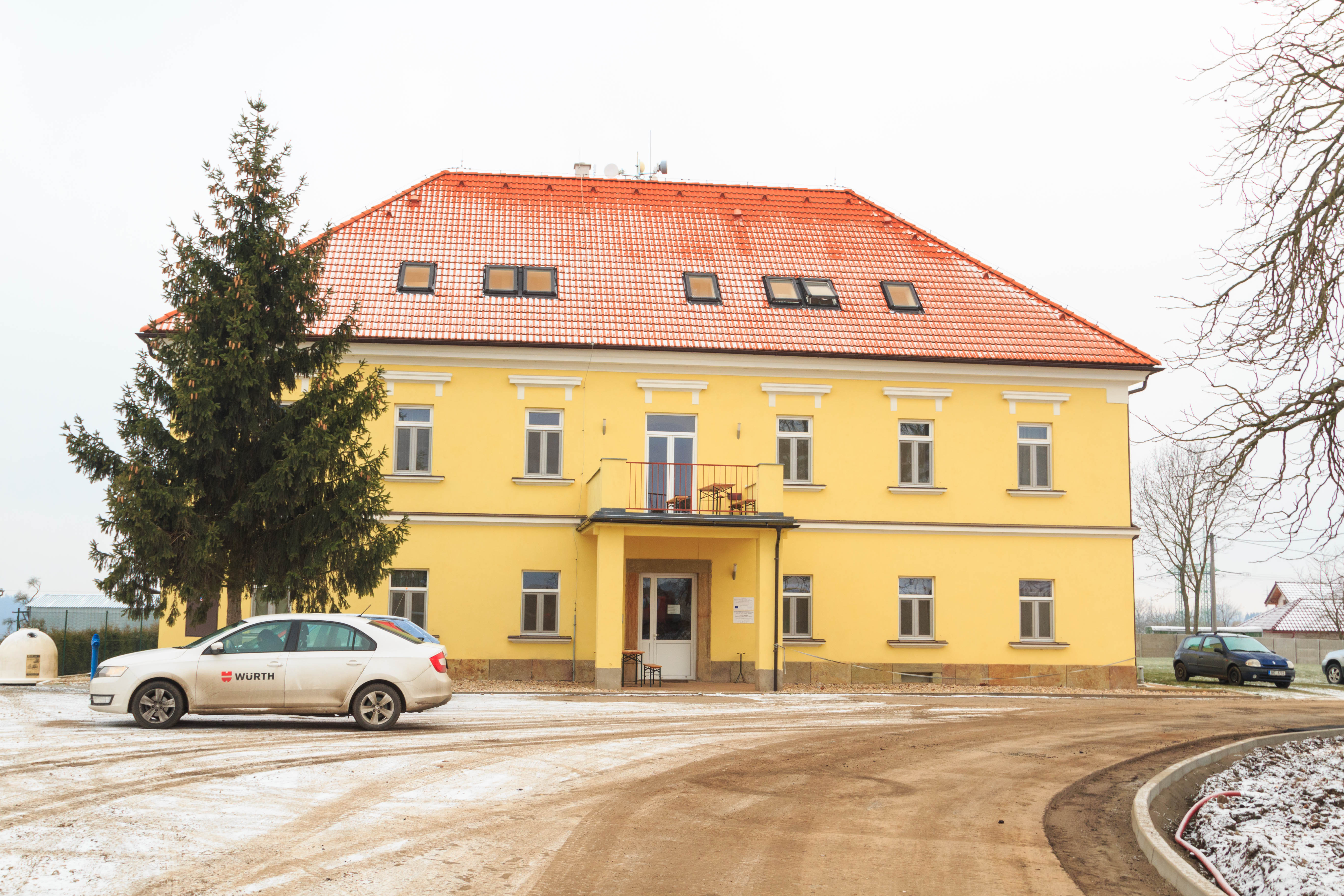 Jedina u Slemene - čp. 1